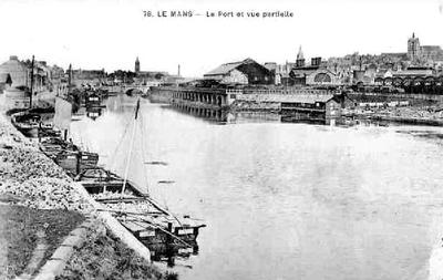 La Sarthe au début du vingtième siècle Projet Babel